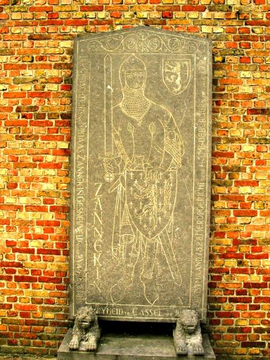 Nicolaas Zannekin - eigen foto